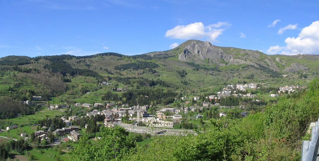 Dalla strada che porta al Tomarlo, vista d'insieme.